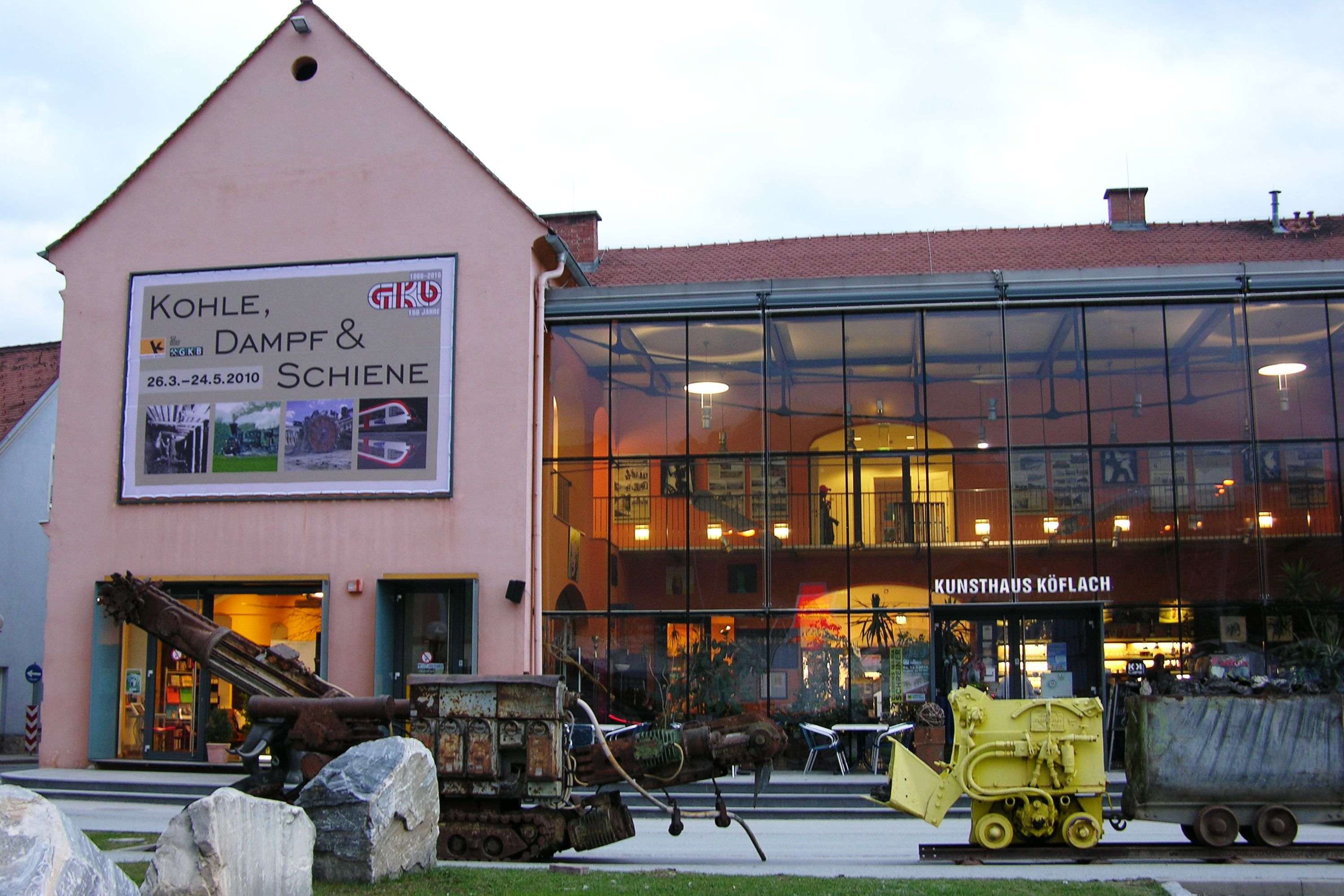 Kunsthaus in Köflach, Steiermark